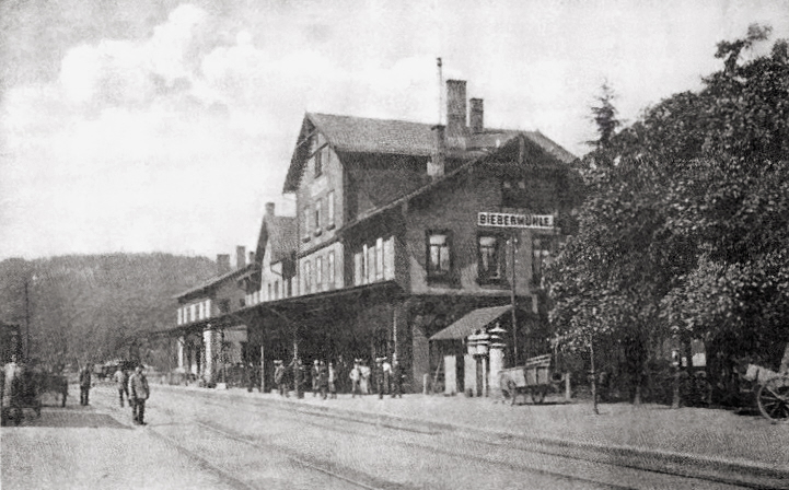 Bahnhof Pirmasens Nord (damals Biebermühle) im Jahr 1912